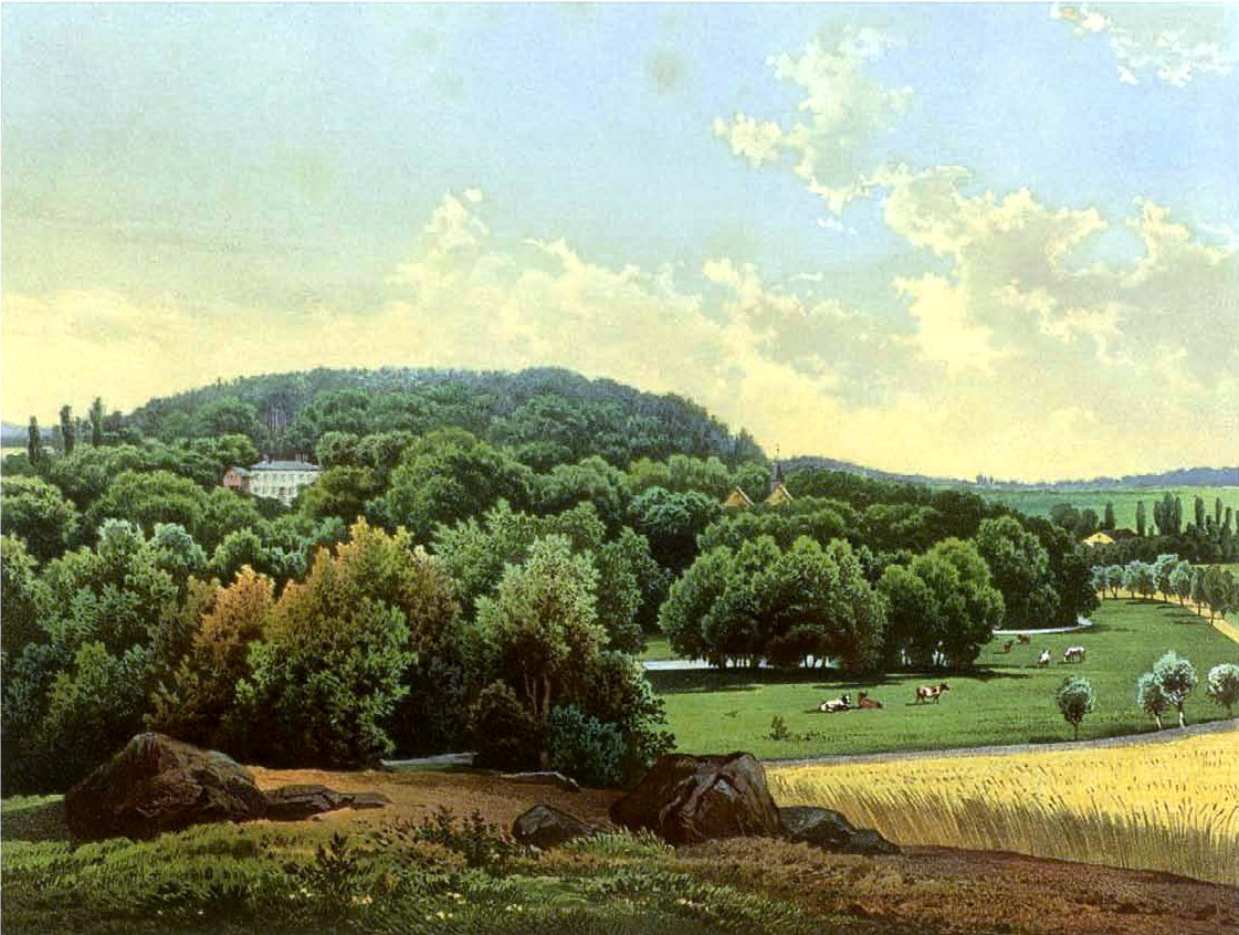 Rittergut Siedkow, Kreis Belgard; vormals in Gemeinde Siedkow, vormals Kreis Belgard, Regierungsbezirk Köstlin, Provinz Pommern. Ab 28.10.1713 durch Kauf von Regierungsrat Hans Joachim von Kleist in Familienbesitz. Meist aber von der Familie zunächst nie selbst bewohnt sondern verpachtet oder durch Gutsverwalter bewirtschaftet. Das Gut umfaßte mit Vorwerken ein Gesamtareal von 4.550 Magdebirger Morgen (Quelle: Aleander Dunker; Wohnsitze des pommerischen Adels)